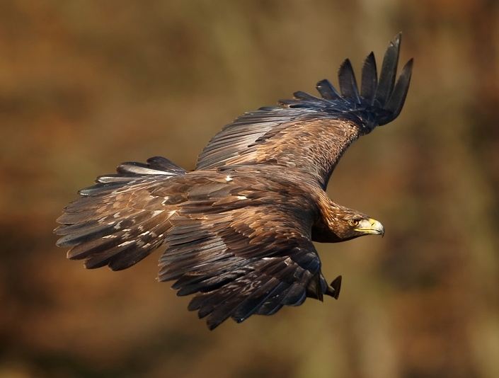 Aquila chrysaetos in flight, Žďárské vrchy, CZ